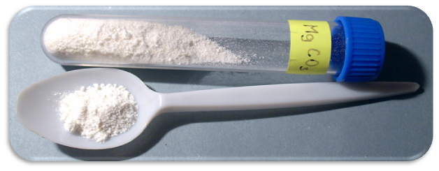 Uhličitan hořečnatý - MgCO3